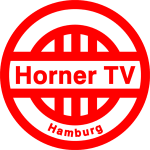 Vereinslogo des Horner TV